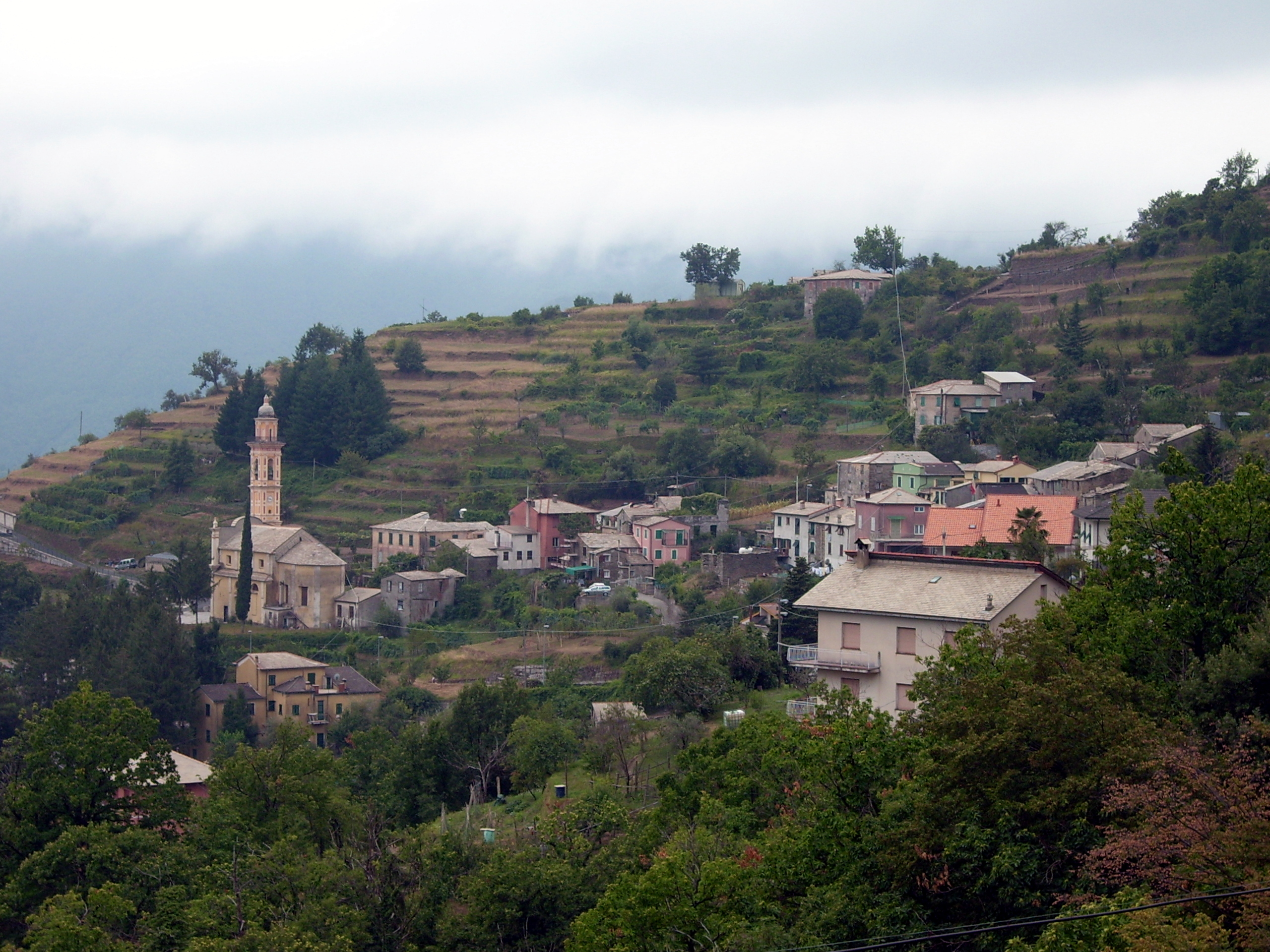 Panorama di Orero, Liguria, Italia